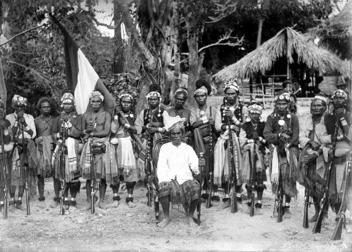 Negatief. Het hoofd van Molo met zijn gevolg op bezoek bij de posthouder van Babaoe, Timor